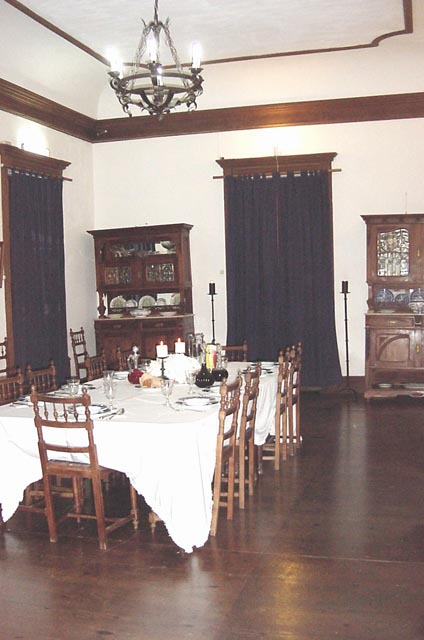 Villa Maria, Sala de Jantar, Angra do Heroísmo, ilha Terceira, Açores, Portugal.